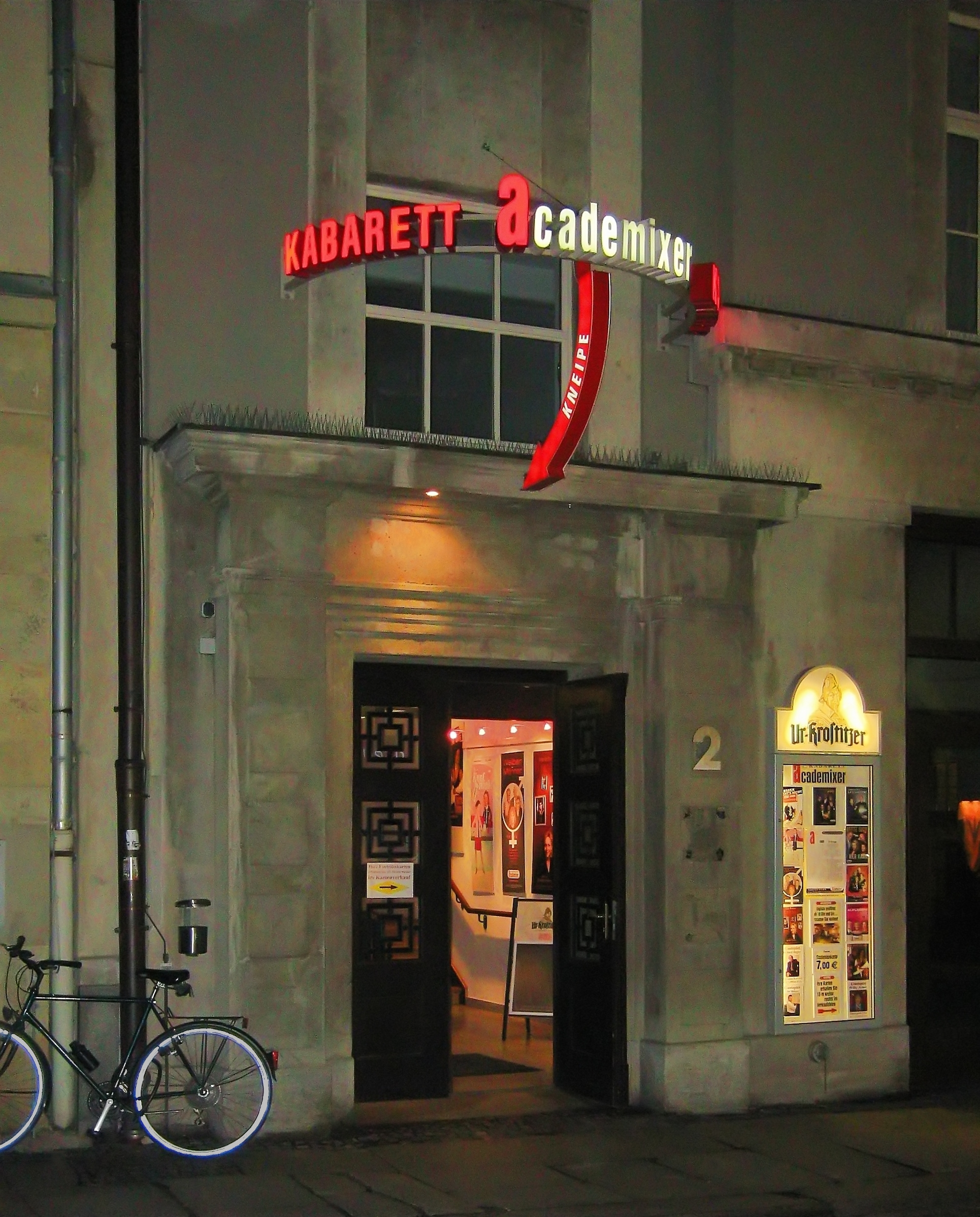 Eingang zum academixer-Keller (Spielstätte des Kabaretts "academixer") in Leipzig, Deutschland.